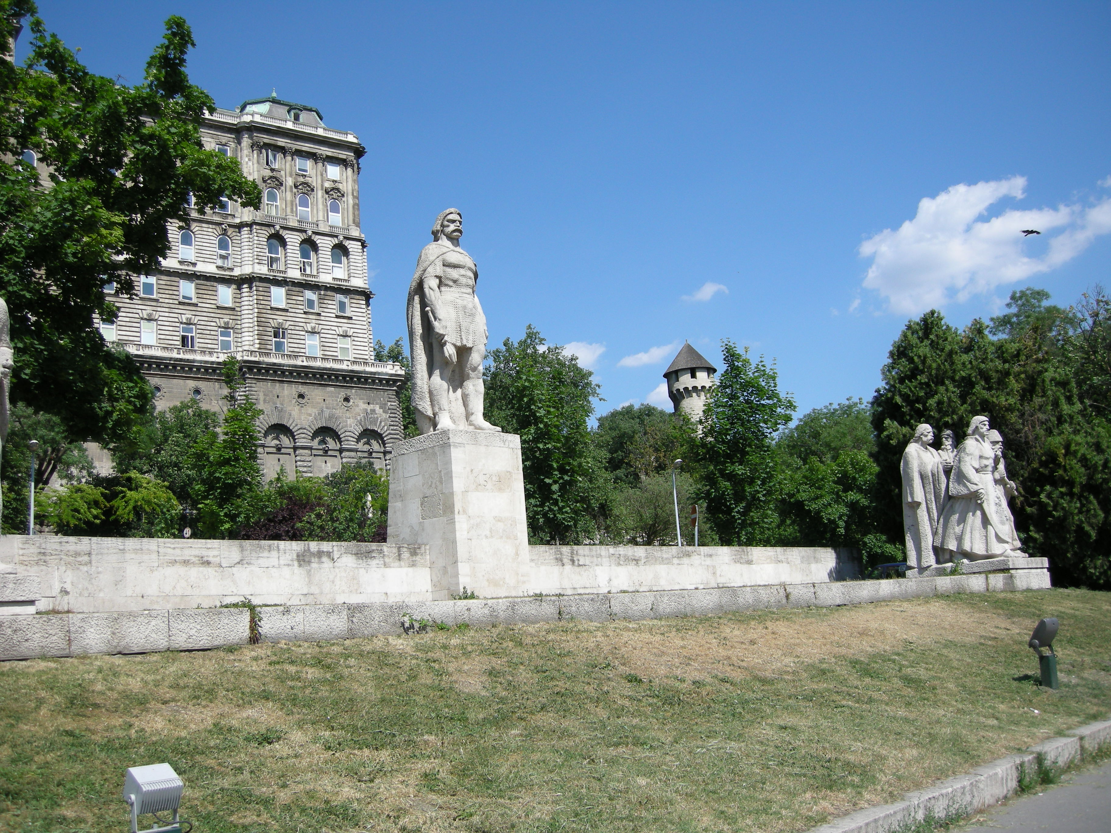 Budapest. Sculptor: István Kiss (1961)